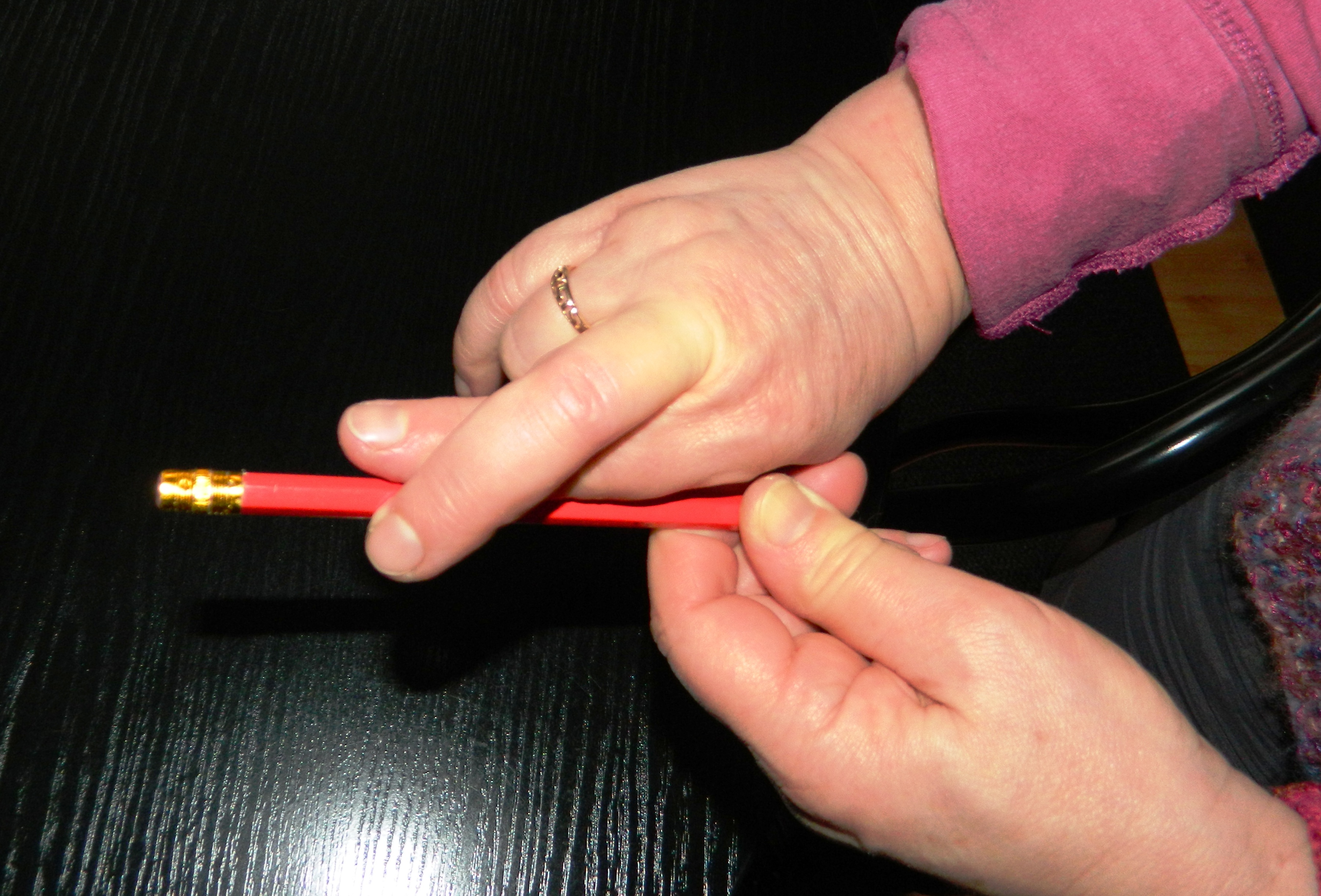 Haptische Illusion Aristotelische Illusion, man spürt zwei Stifte.